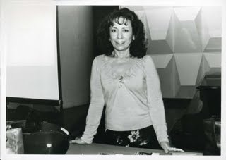 Fotografía de Alicia Urreta. Año y autor desconocidos.